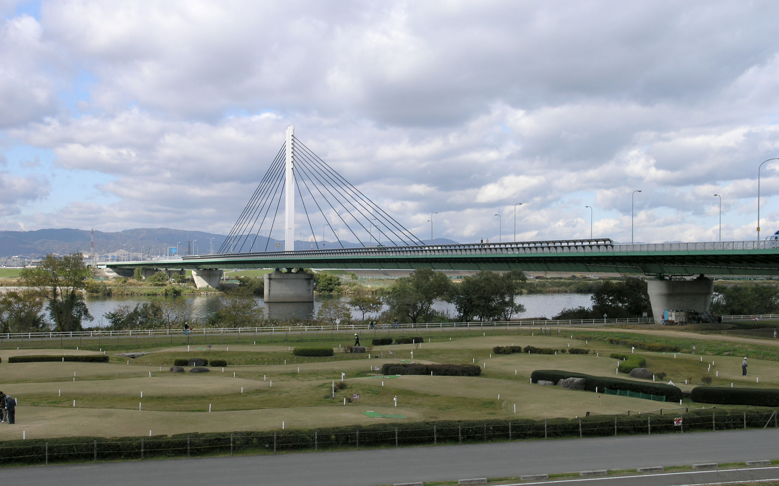 鳥飼仁和寺大橋（大阪府摂津市-寝屋川市） 2008年11月撮影。 機材：C8080WZ 撮影者：Kansai explorer 撮影後レタッチ・トリミング